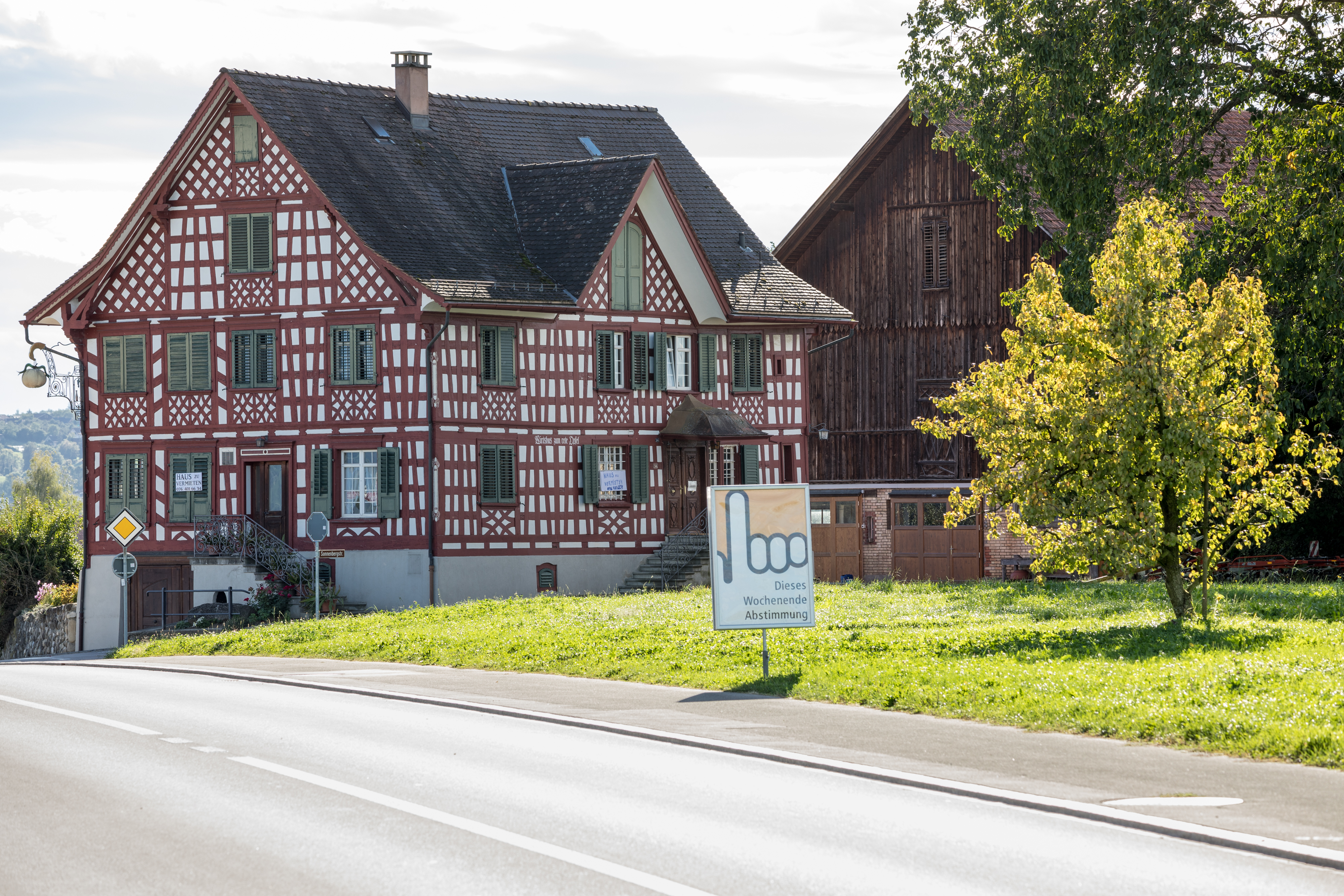 Haus zum Roten Öpfel